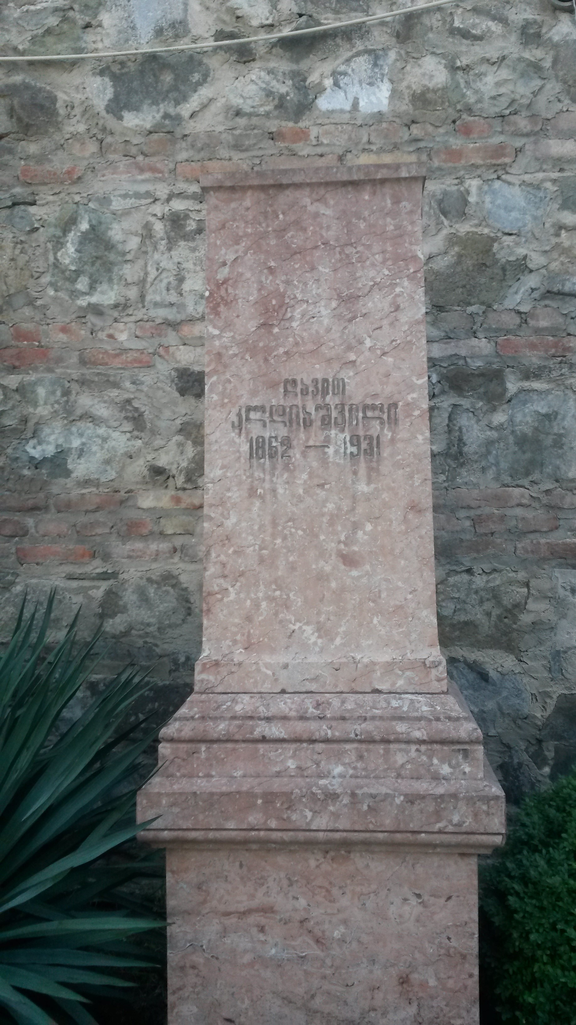 მთაწმინდის პანთეონი